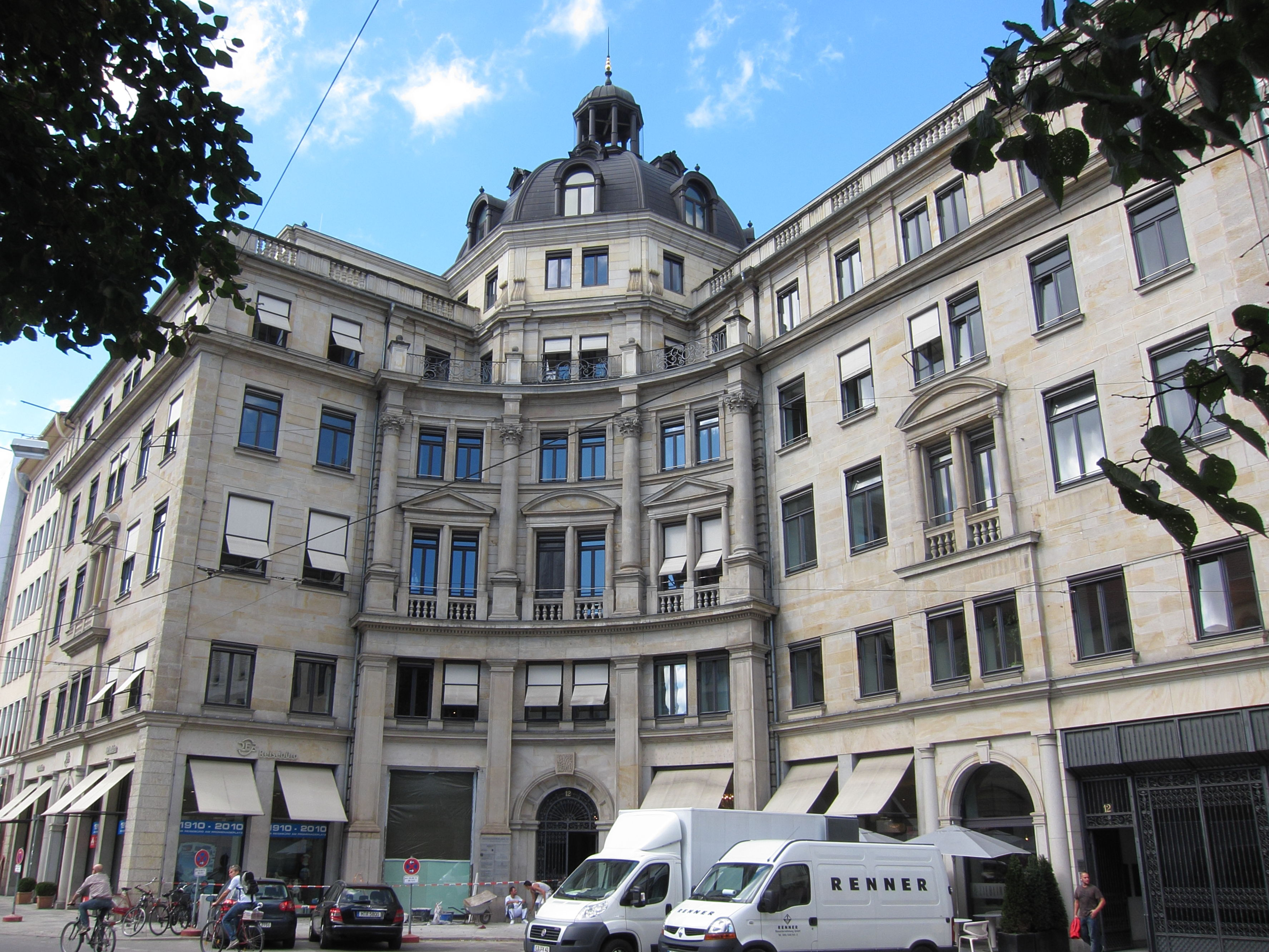 Promenadeplatz 12; Parcus-Haus, stattlicher fünfgeschossiger Neurenaissancebau mit einspringender Ecke und (reduzierter) Kuppel, 1887-88 von Friedrich von Thiersch; Hausteinfassade z. T. vereinfacht.